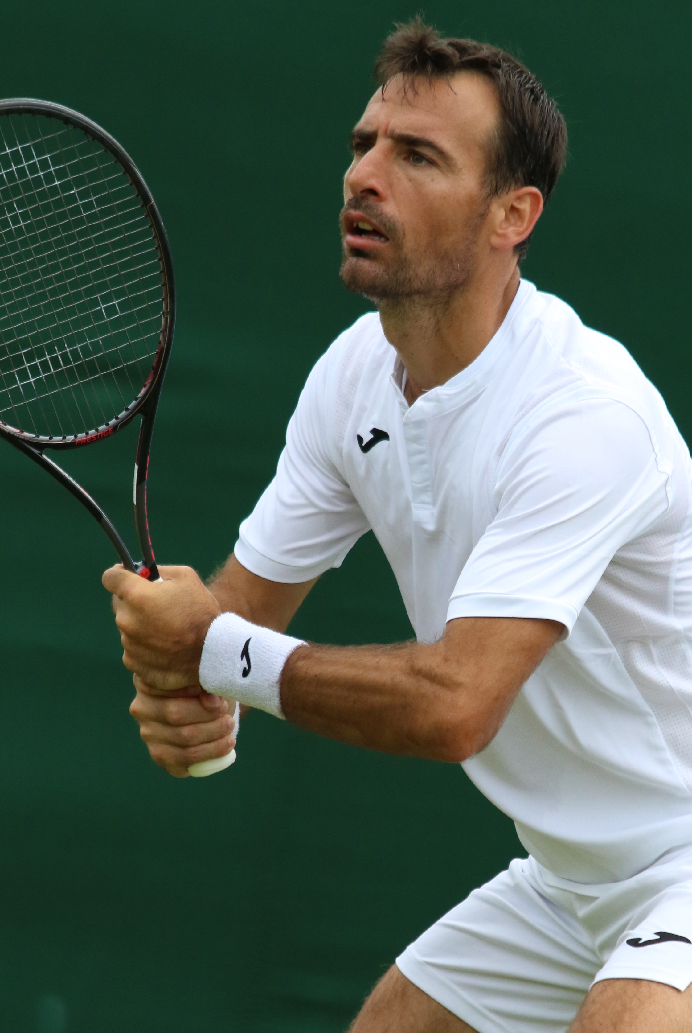 Dodig WM19 (8)